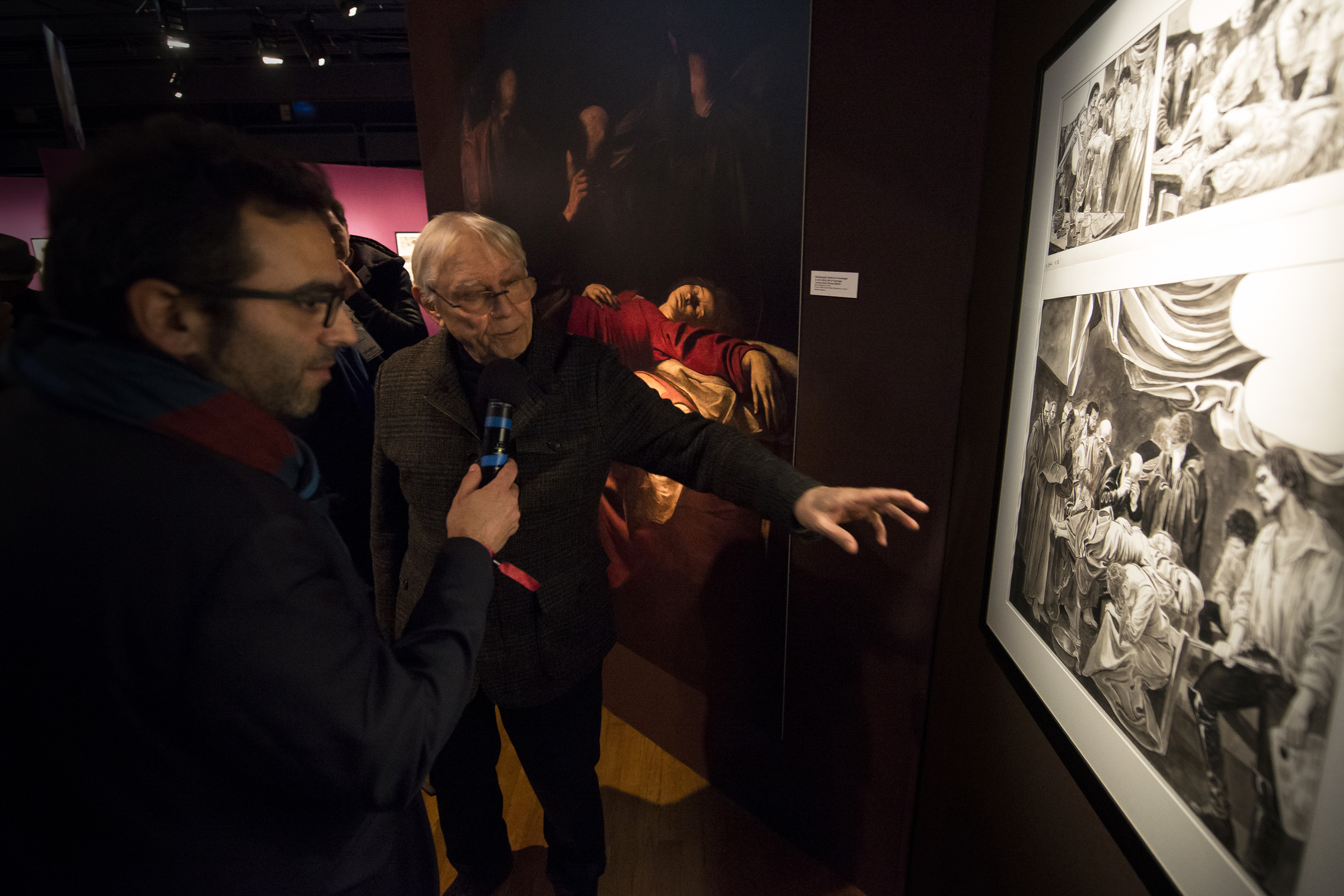 Milo Manara dans son exposition, "Itinéraire d'un maestro de Pratt à Caravage". Festival International de la Bande Dessinée d'Angoulême 2019.